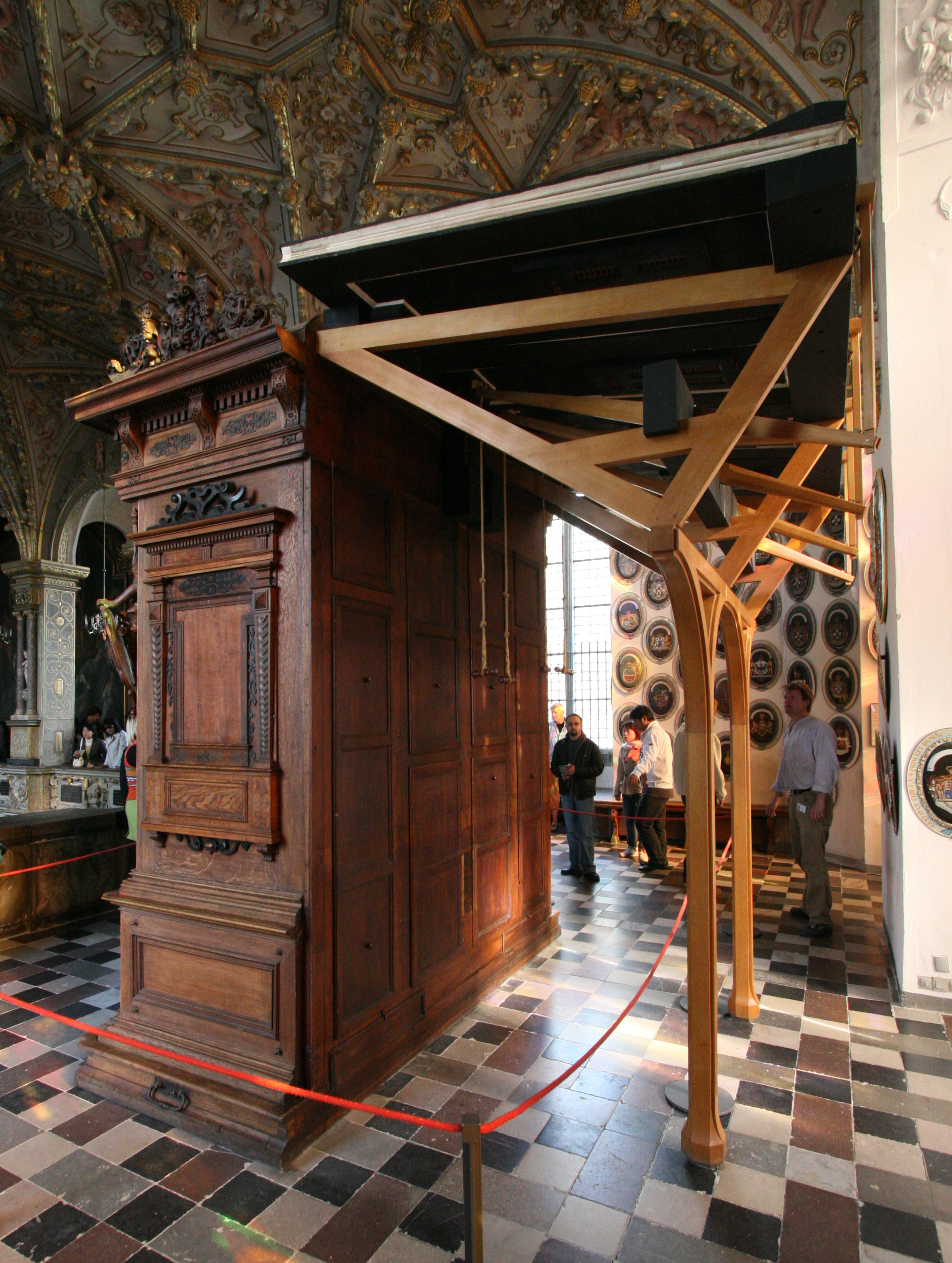 Frederiksborg Slotkirke, Hillerød, Denmark. Compenius organ. New bellows.